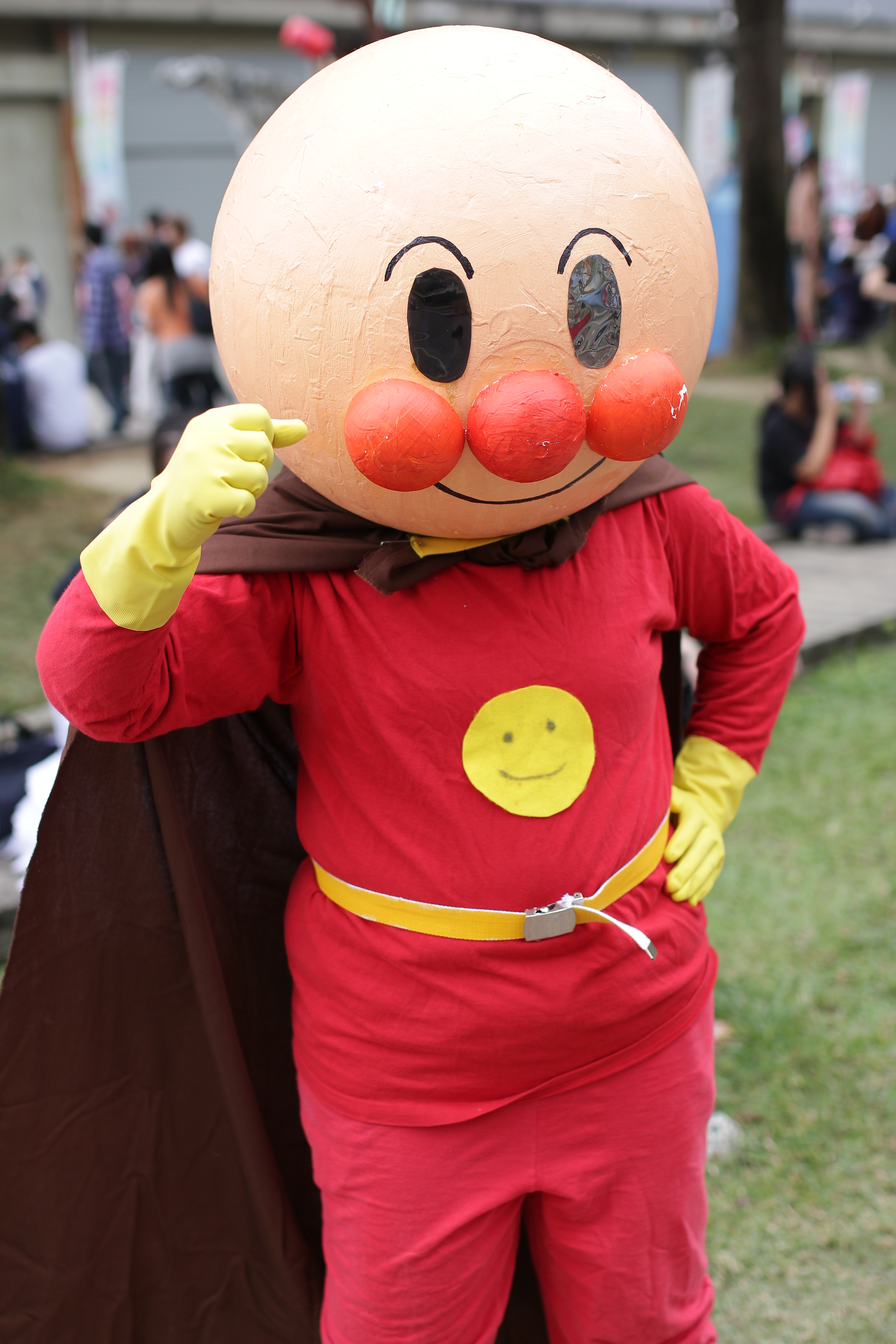 2014駁二動漫祭，麵包超人cosplayer。